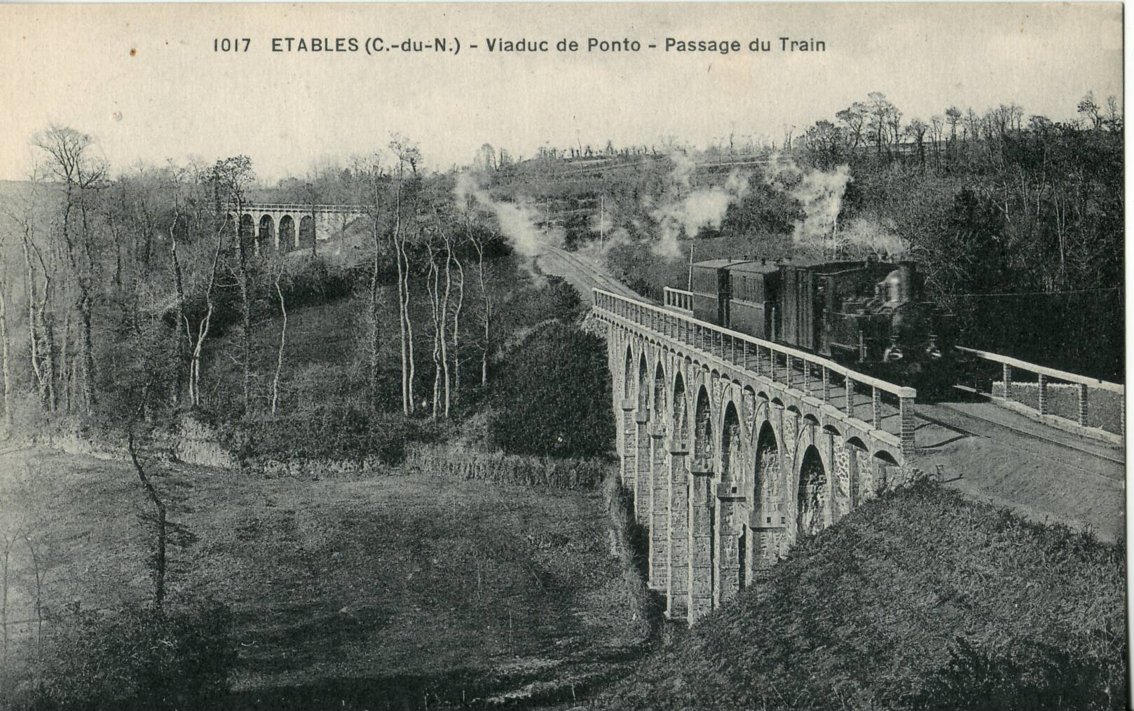 Carte postale ancienne sans mention d'éditeur, n°1017 : ÉTABLES - Le Viaduc de Ponto - Passage du Train